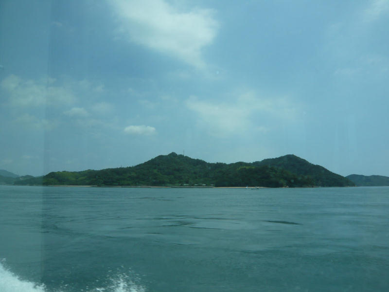 上島町赤穂根島